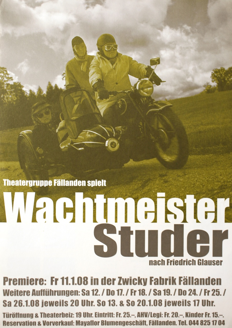 Werbeplakat für die Theater-Aufführung von "Wachtmeister Studer" in Fällanden